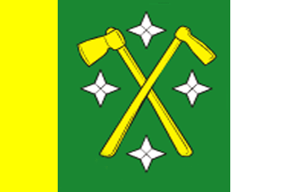 Prapor obce Malá Bystřice